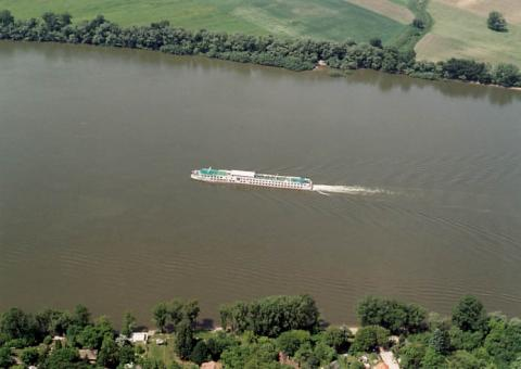 Dunakanyar, Hunagry